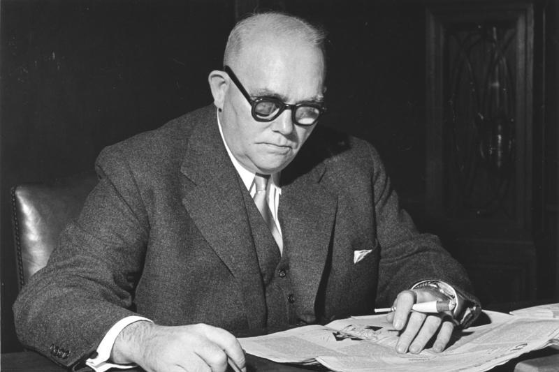 Bundesbevollmächtigter für Berlin Dr. Vockel